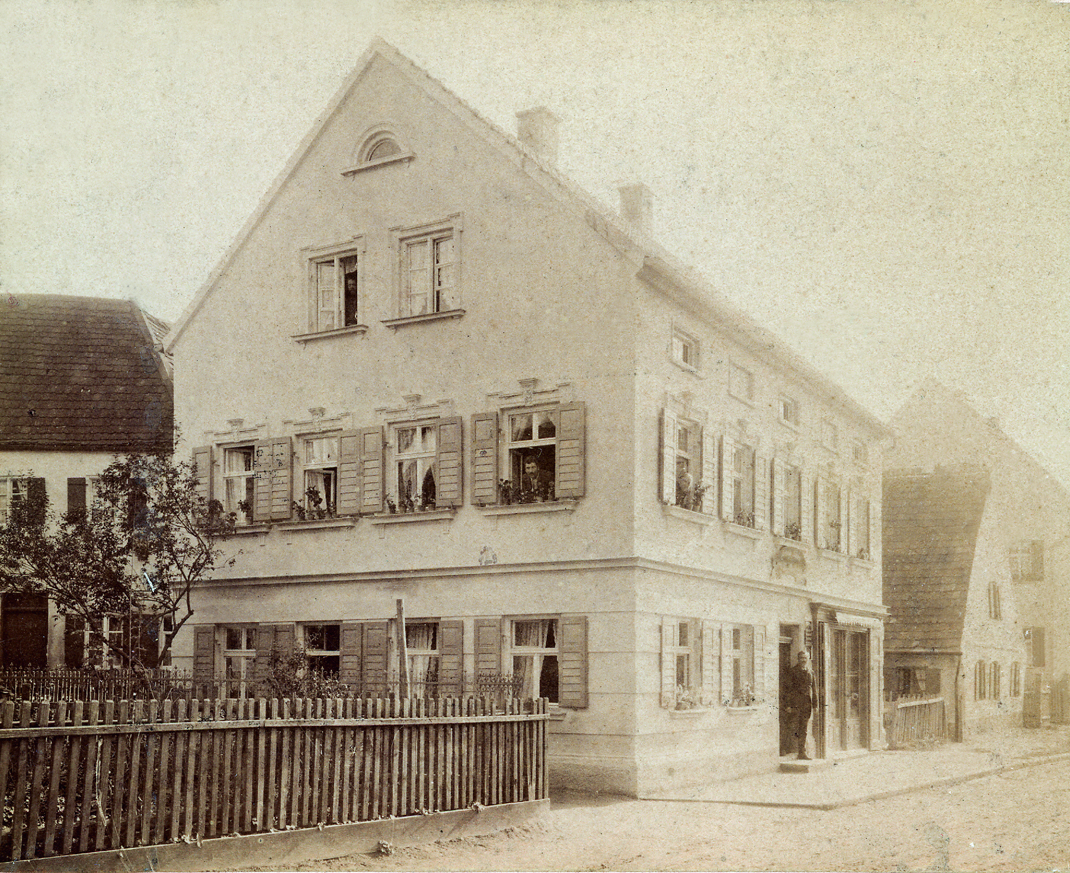 Buchdruckerei Ignaz Mayer Aichach